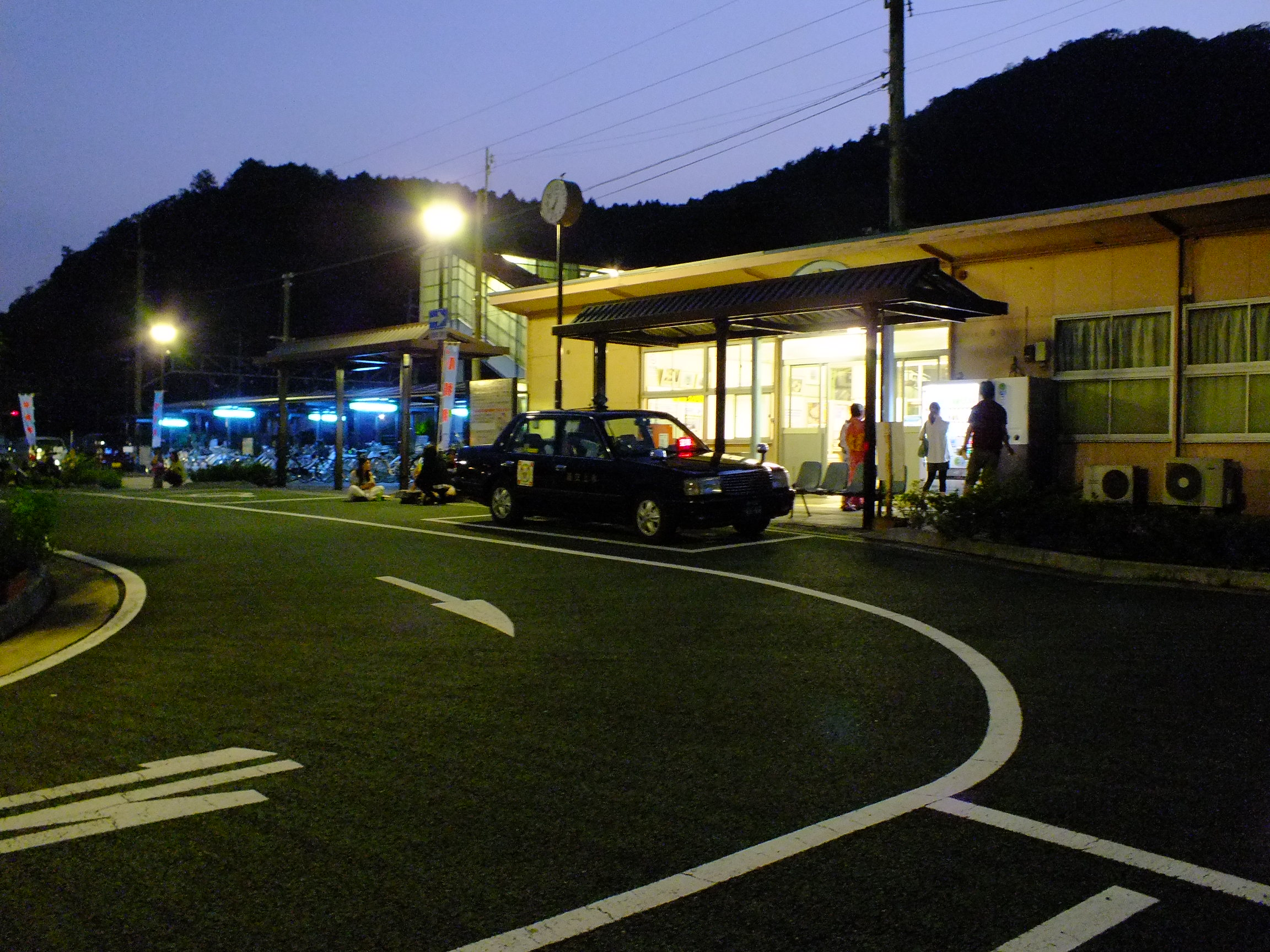 20140729 Ichijima-Kawasuso Matsuri 市島川裾祭（丹波市市島町）市島駅